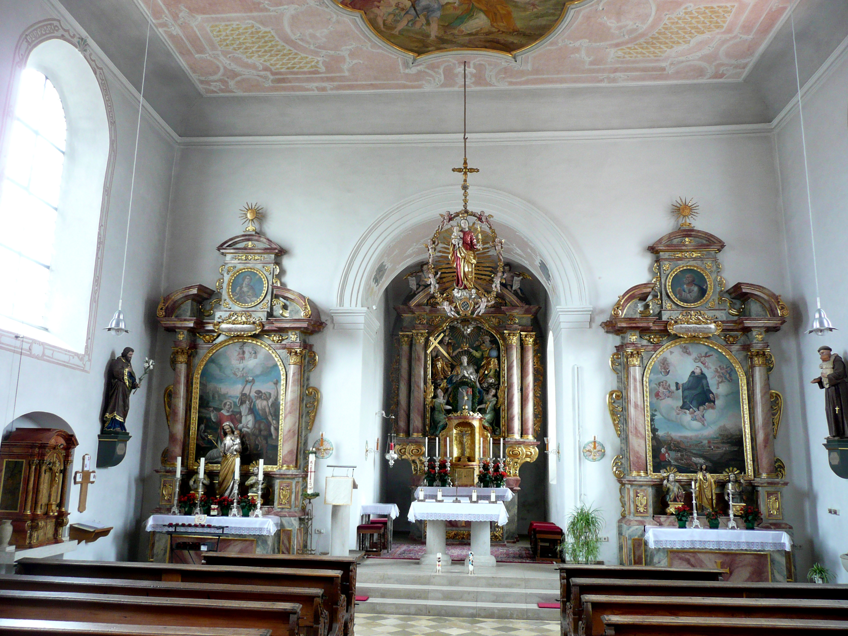 Katholische Pfarrkirche Mariä Himmelfahrt in Möckenlohe. Innenansicht. This is a photograph of an architectural monument.